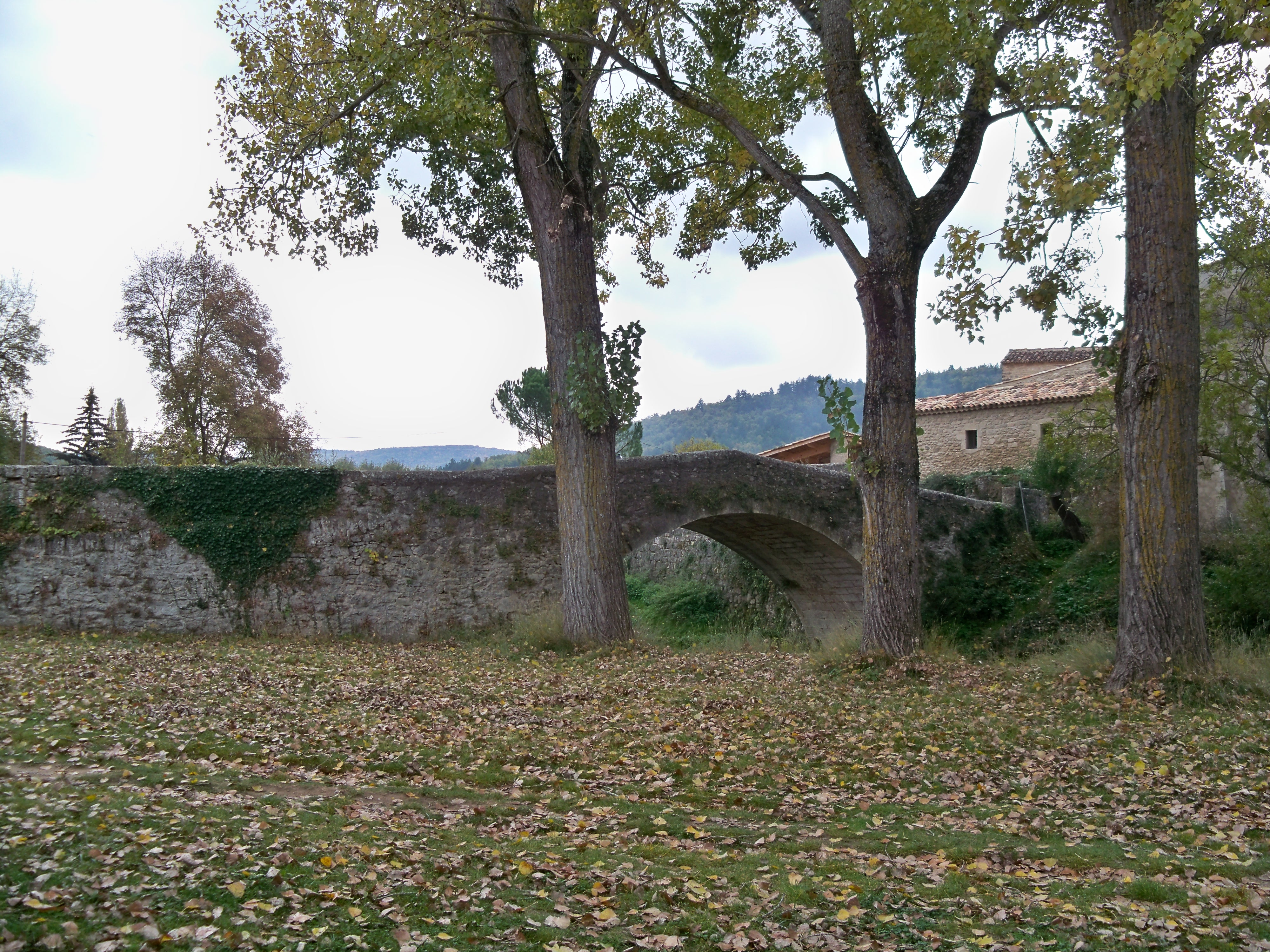 Pont Roman de Céreste, not romain, Alpes de Haute Provence, France